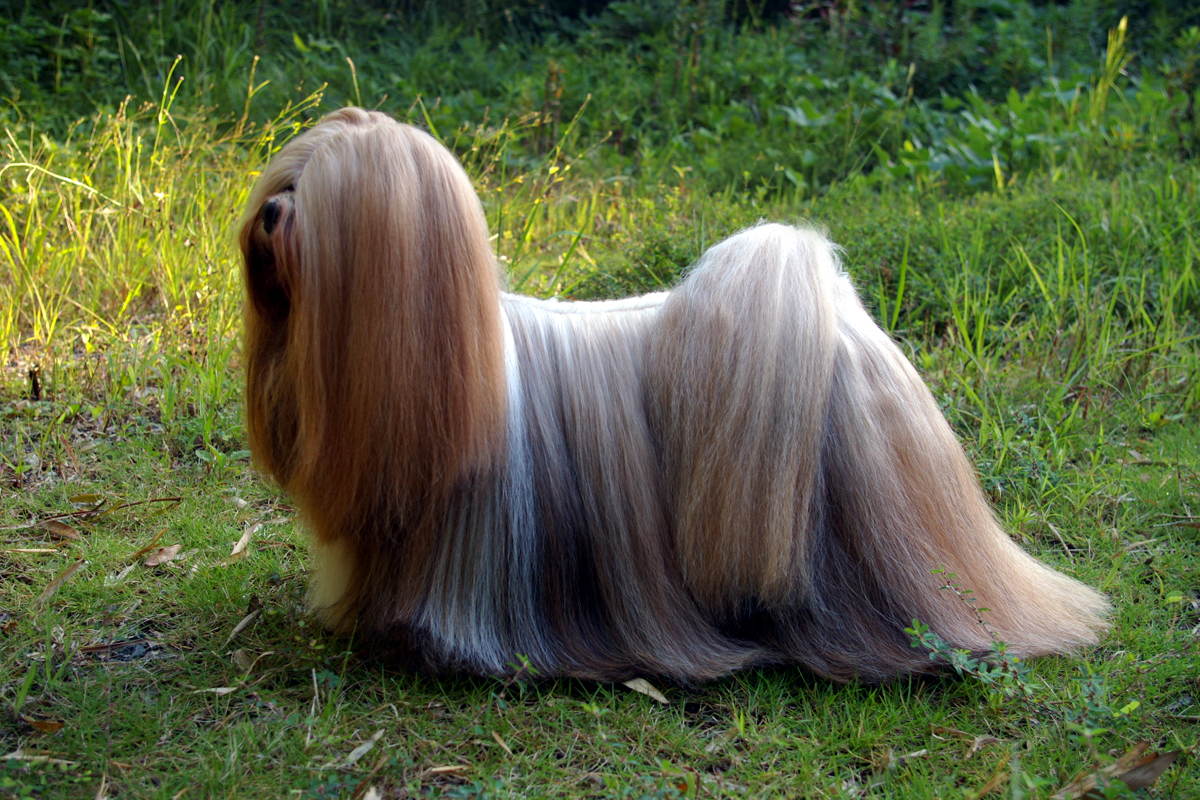 ラサ・アプソ